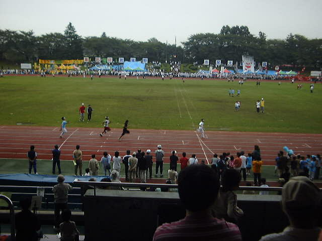 第15回武蔵野市民大運動会の模様（2004年10月11日）